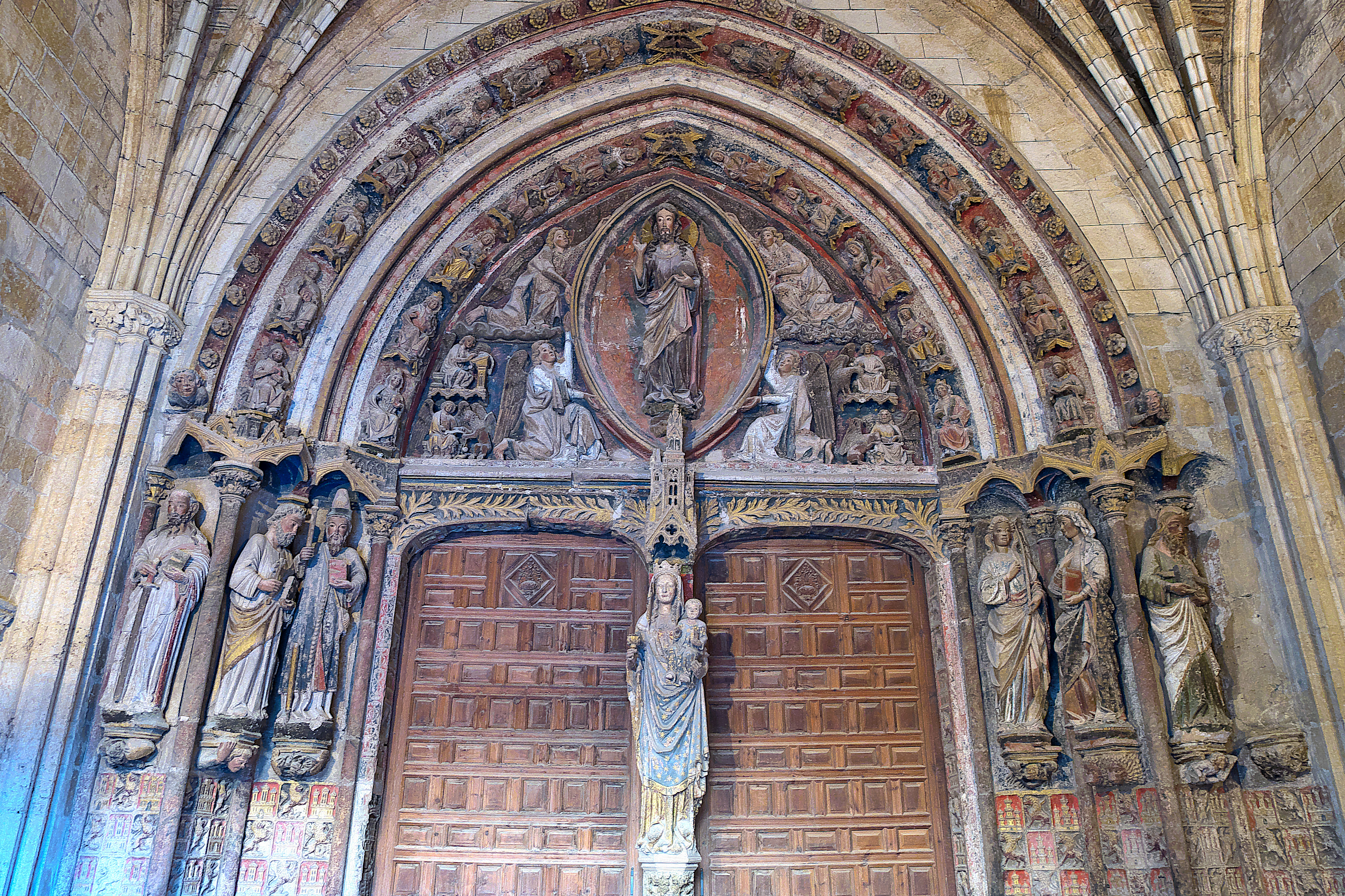 Portada norte de la catedral, situada en el extremo del transepto. Preside Cristo en la mandorla. Principios del siglo XIV.